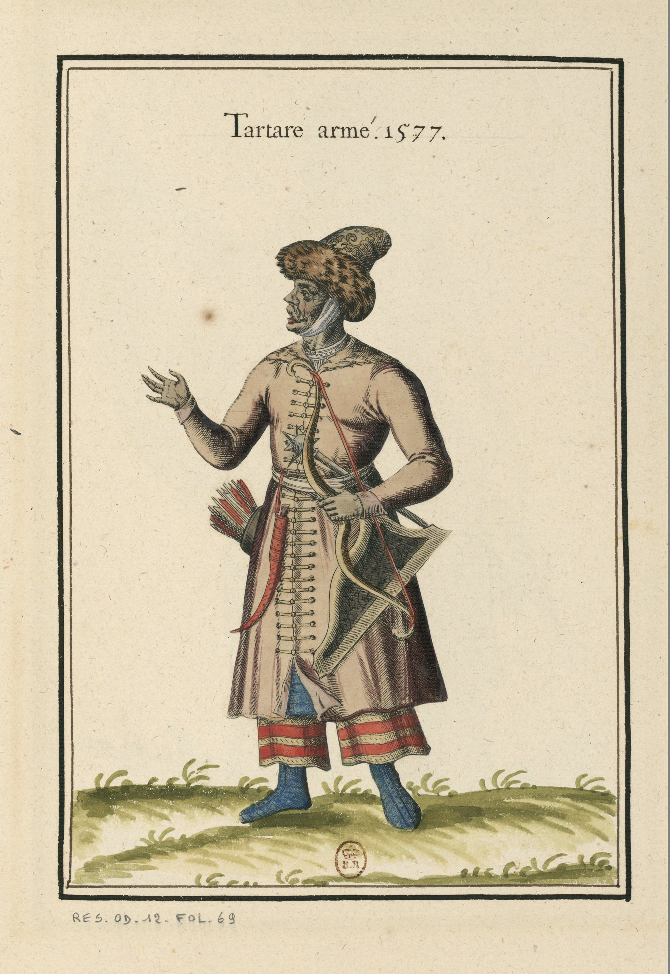 Ensemble de gravures de costumes de Turquie du XVIe siècle